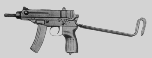 Sa vz. 61 Škorpion (Scorpion SMG)